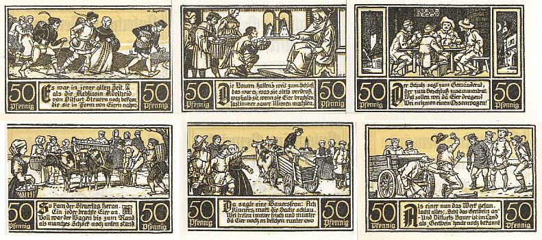 Ditfurt Notgeldscheine 1921, Rückseite. Die Bildergeschichte erklärt, wie der Ausdruck Geelbein entstand (der Text ist für bessere Lesbarkeit in den Bildnotizen eingefügt).